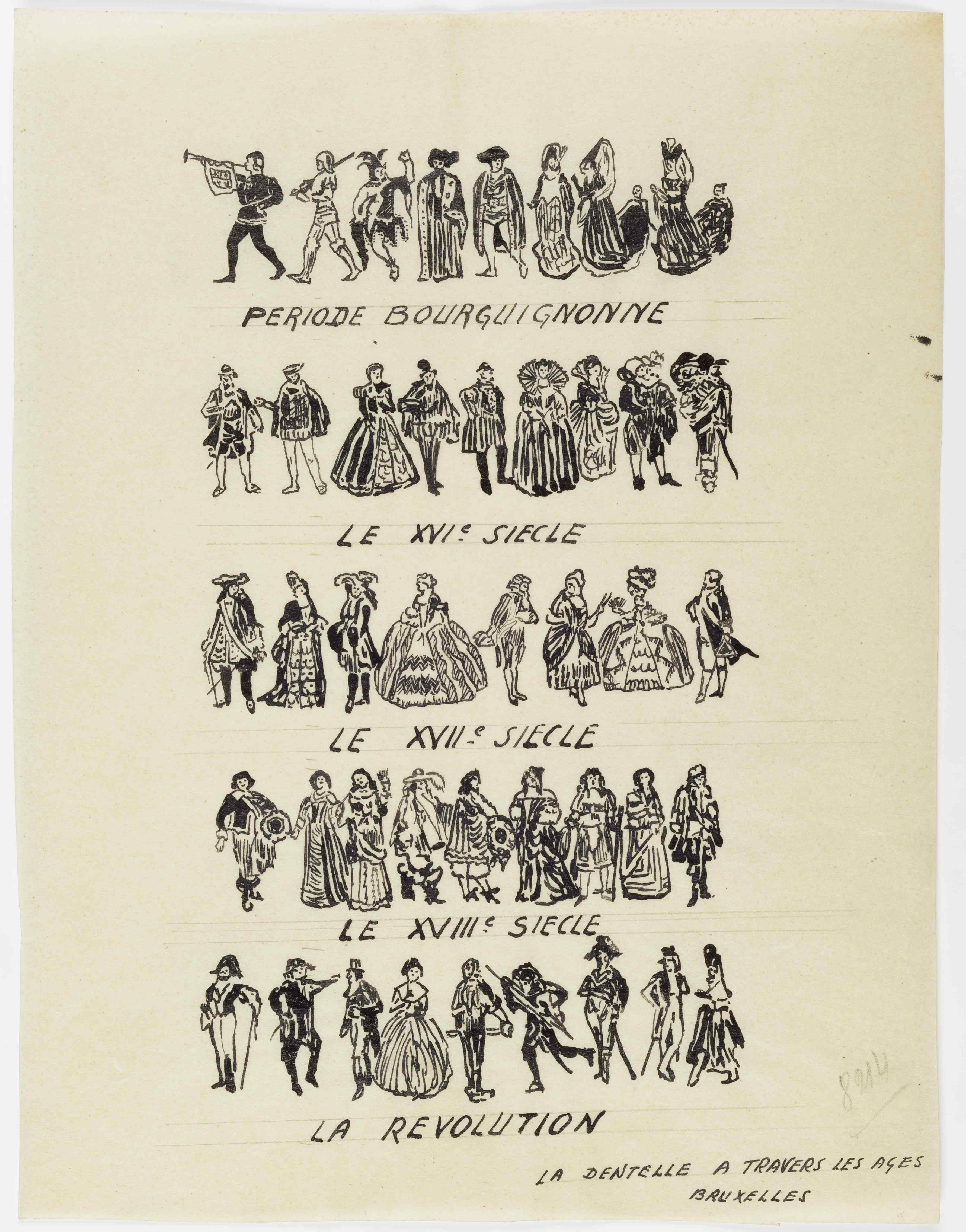 Encyclopedia Universalis Mundaneum. Dessins des tenues vestimentaires à différentes époques: période bourguignonne, XVIème, XVIIème, XVIIIème et la Révolution.